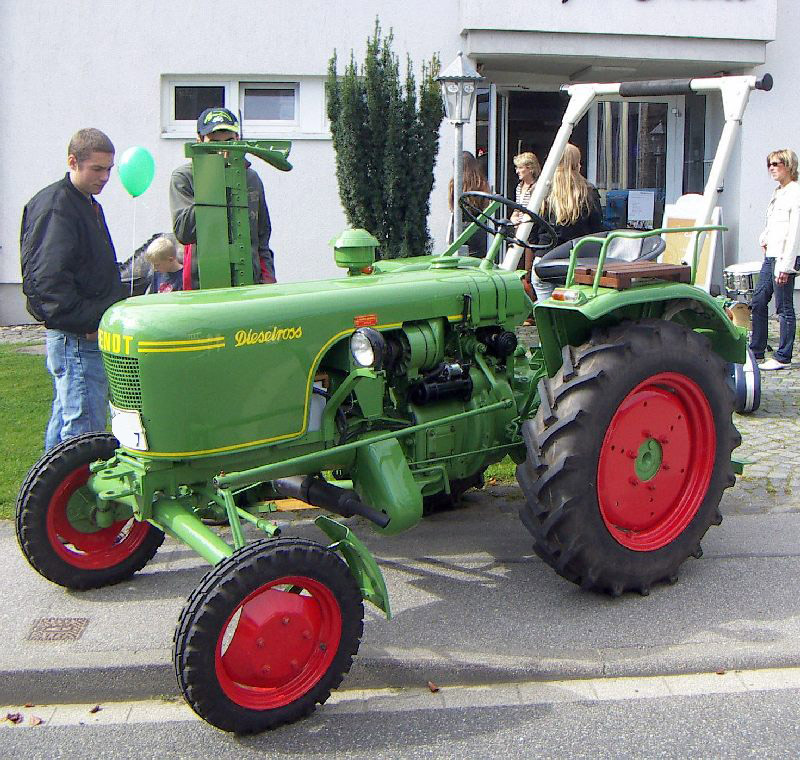 Fendt Dieselross bei der Treckerparade beim Wirtschaftstag in Monschau-Imgenbroich (Eifel, Deutschland)